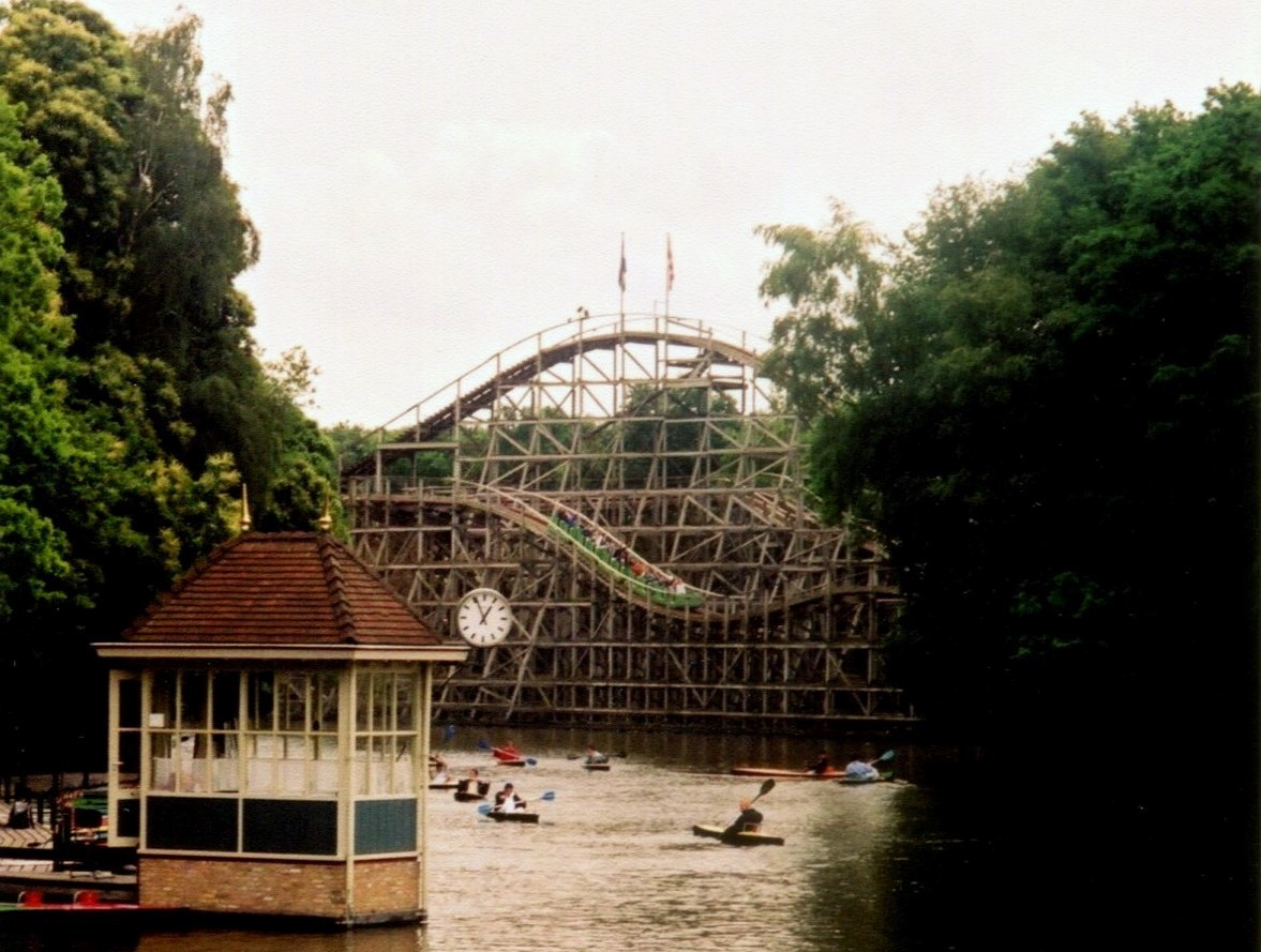 EftelingPegasusKanovijver